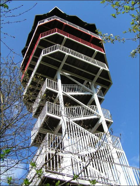 Vyhliadkova_veza Kosice